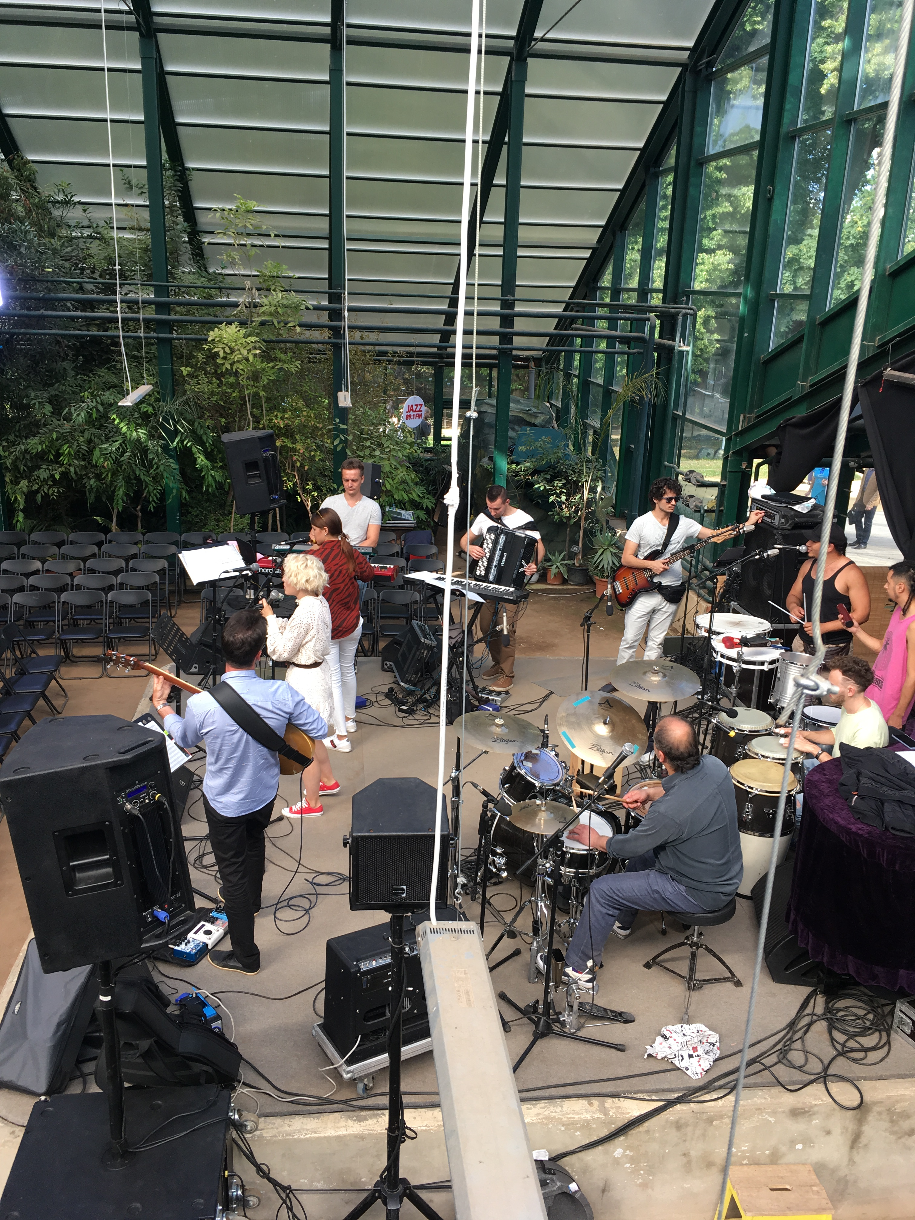 Оранжерея в аптекарском огороде, Москва